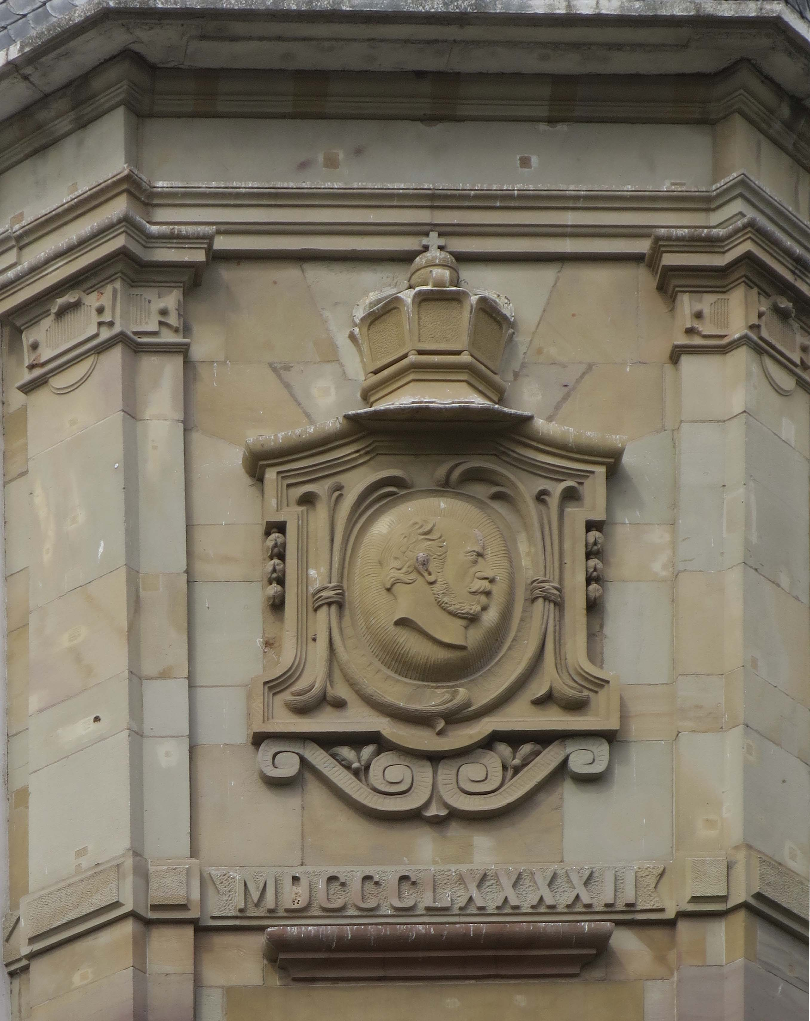 Worms, Wilhelm-Leuschner-Straße 19